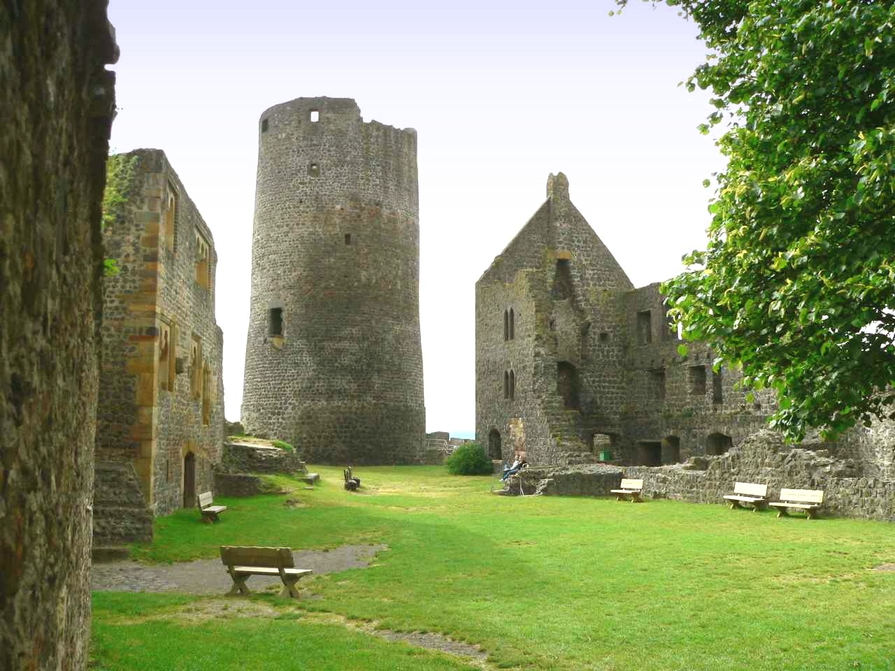 Burgruine Münzenberg - Innenhof der Kernburg, Hessen, Germany